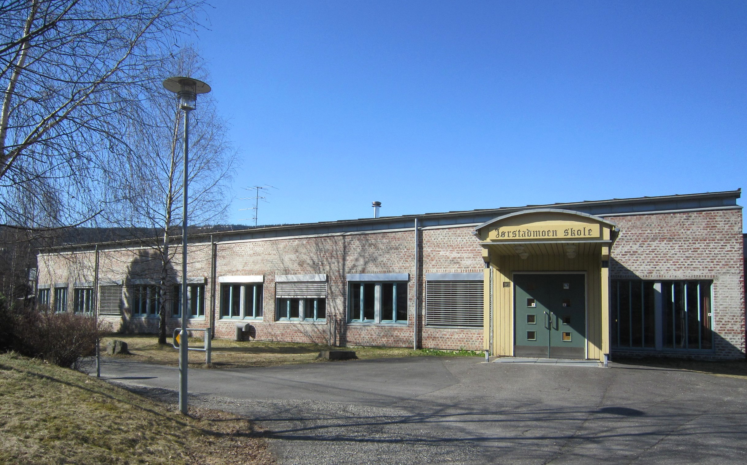 Den nye delen (fra 2000) av Jørstadmoen skole på Fåberg (Lillehammer kommune)